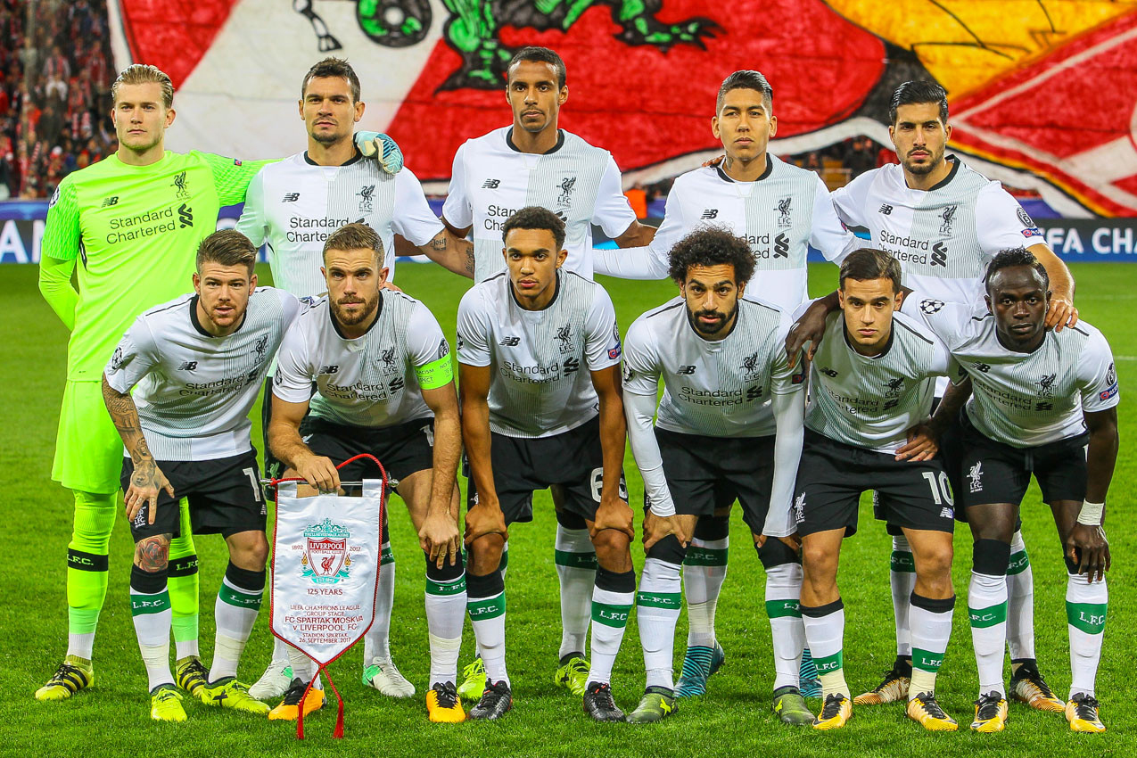 «Спартак» - «Ливерпуль»